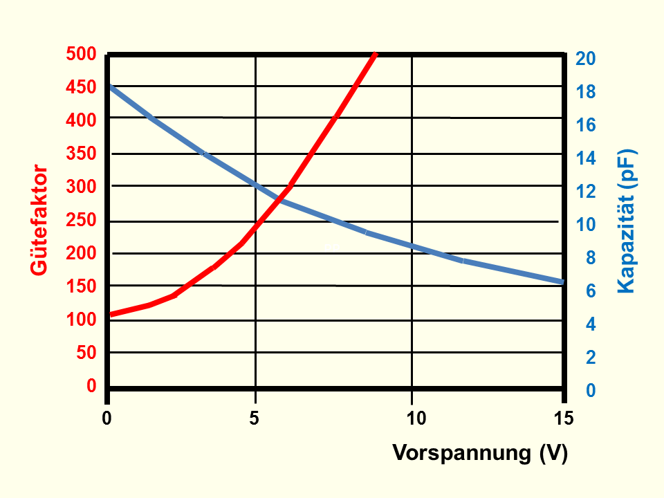 Typischer Kurvenverlauf der Kapazität und des Gütefaktors von BST-Varaktoren in Abhängigkeit von der Vorspannung (Messfrequenz 1 MHz)